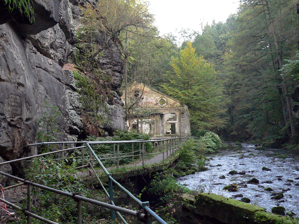 Liebethaler Grund in der Sächsischen Schweiz mit einem verfallenen Gebäude des ehemaligen Wasserkraftwerks im Hintergrund